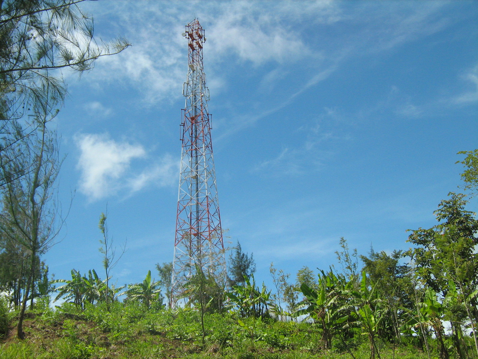 അഗളിയിൽ സ്ഥാപിച്ചിരിക്കുന്ന ഒരു മൊബൈൽ ടവർ.